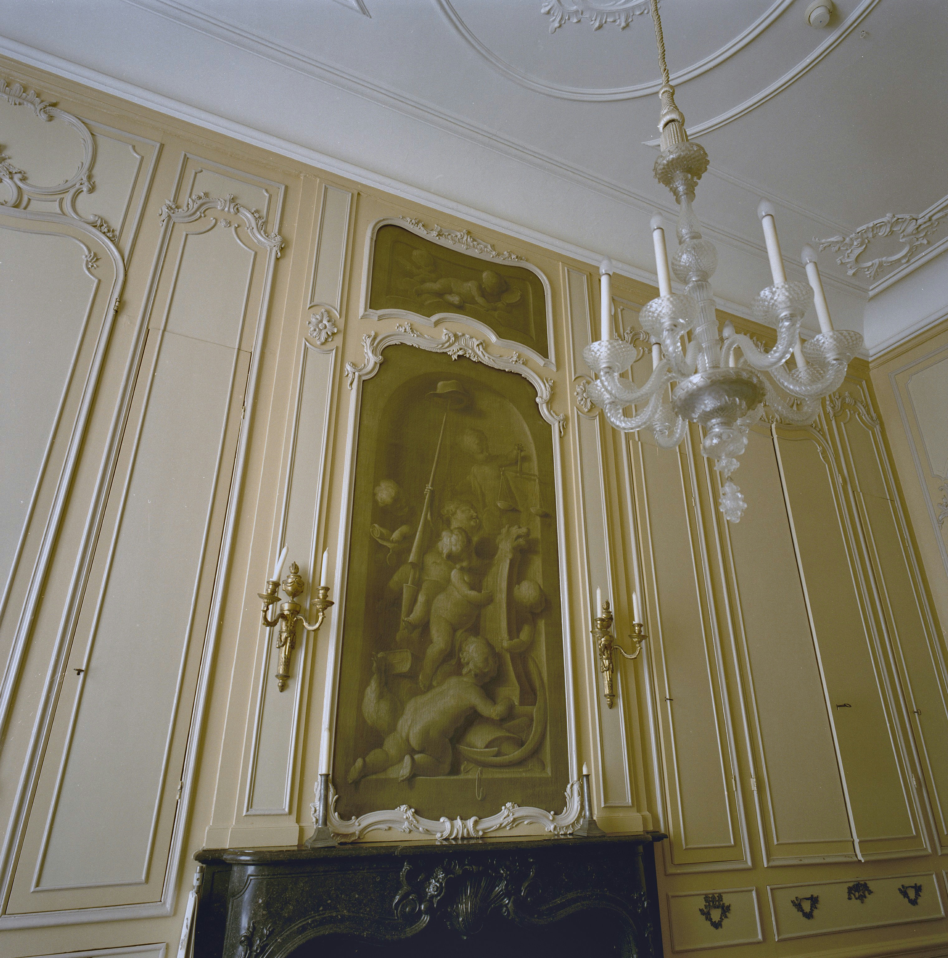 Van De Perrehuis: Interieur, schoorsteenstuk in het Kabinet (opmerking: Oudbouw = Van de Perrehuis)